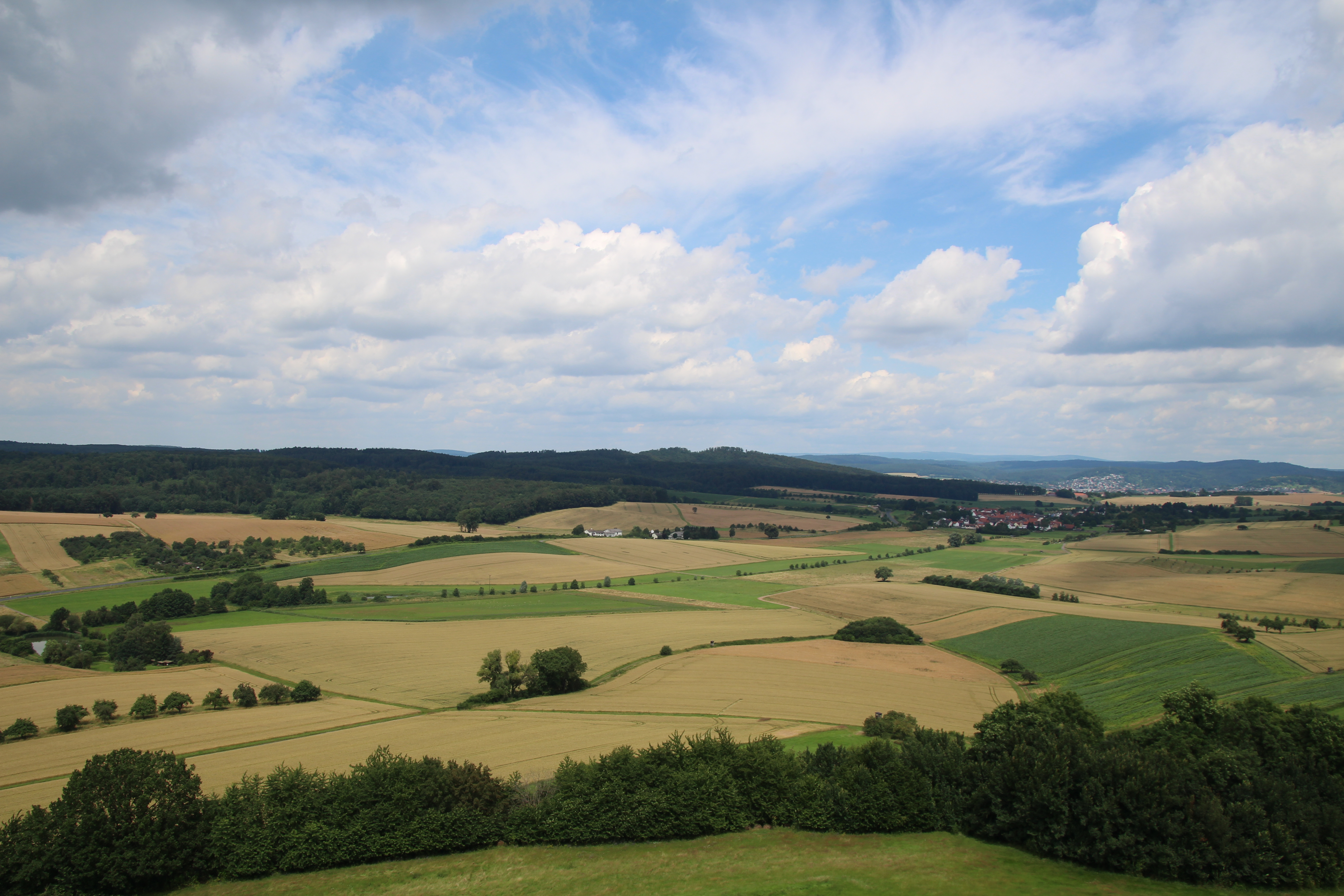 Foto